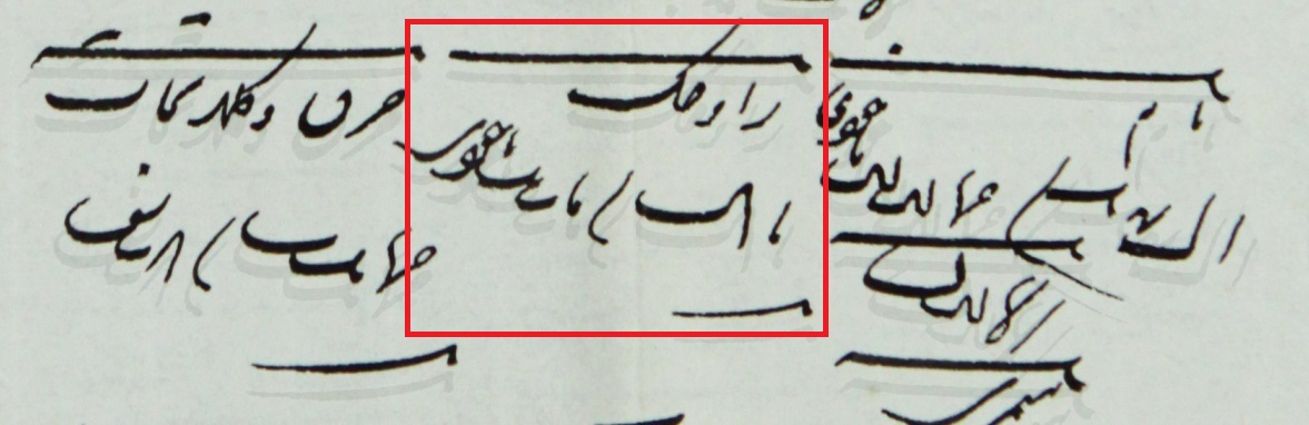 روستا راوخ در دوره ناصرالدین شاه درسال1314 ه.ق/1275 ش از مهمترین روستاهای ولایات بام و صفی اباد به شمار می رفته و اسم آن به عنوان یکی از روستاهای مالیات دهنده در صورت جمع و خرج ولایات مملکت خراسان سنه بیچی ئیل ذکر شده است